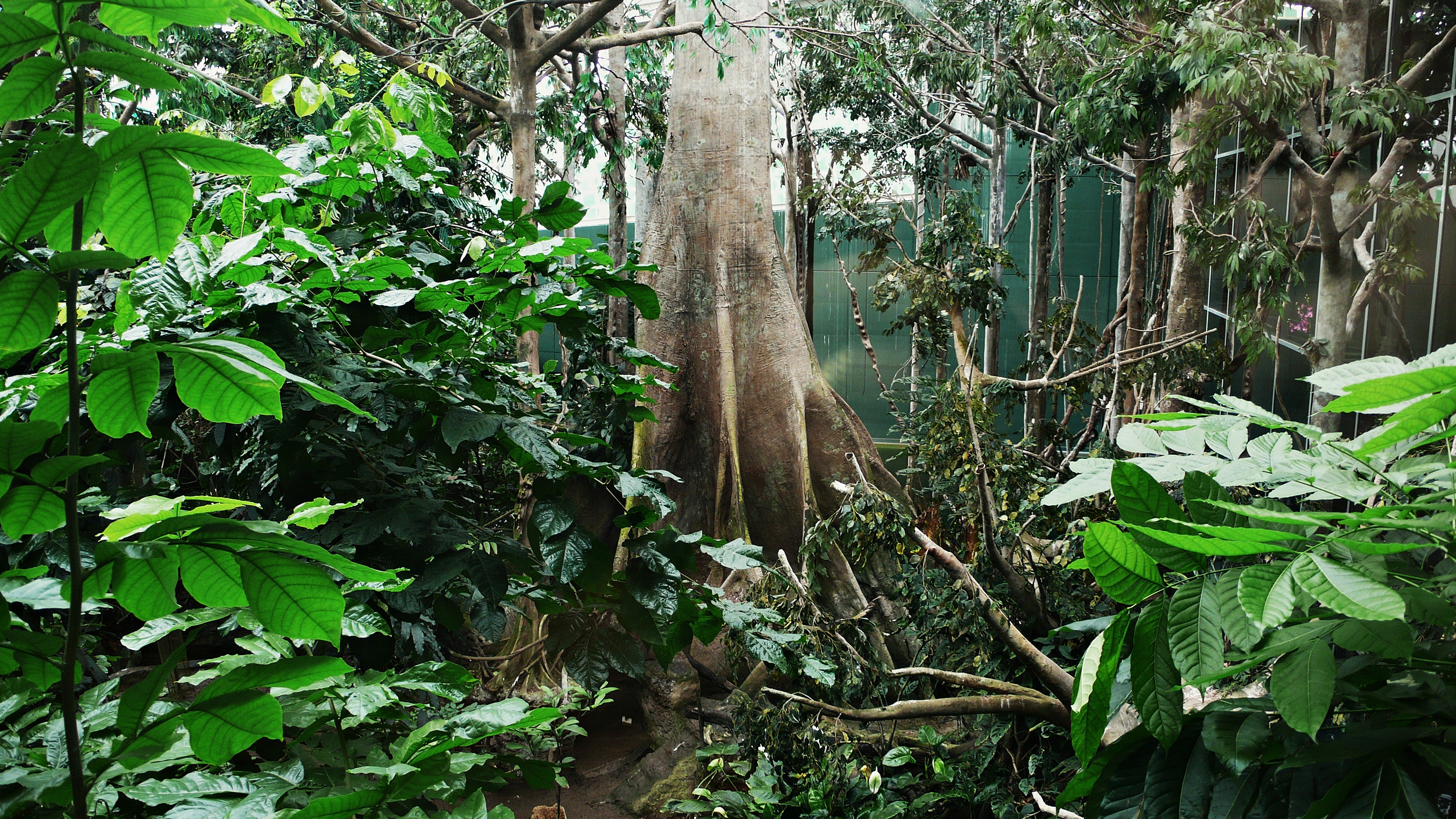 barcelona-cataluña